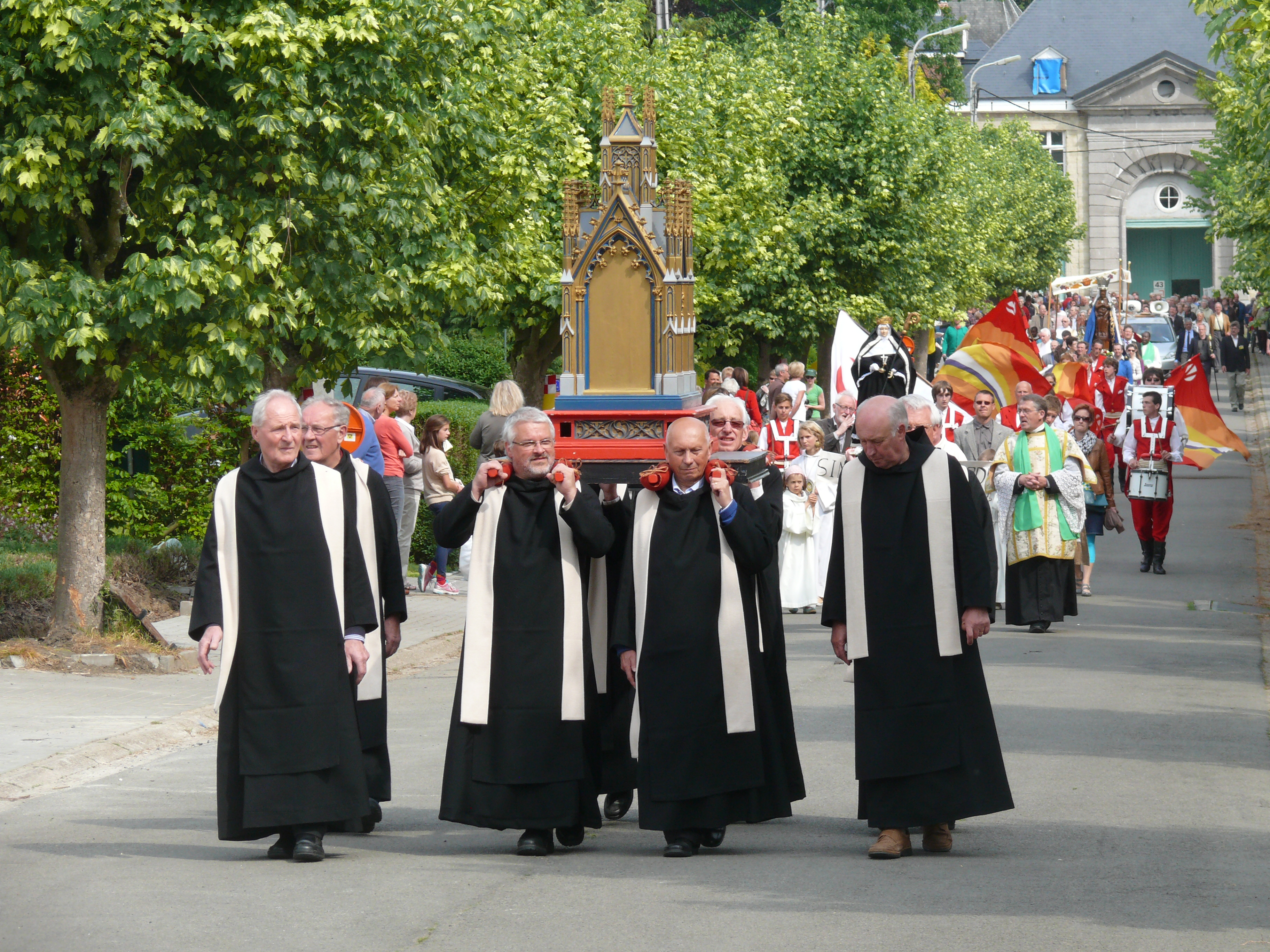 Sint-Wivinaprocessie - zicht op schrijn